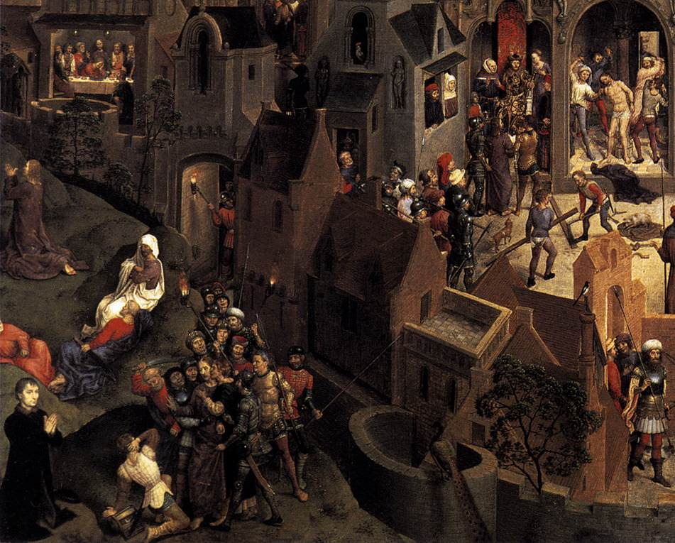 detail